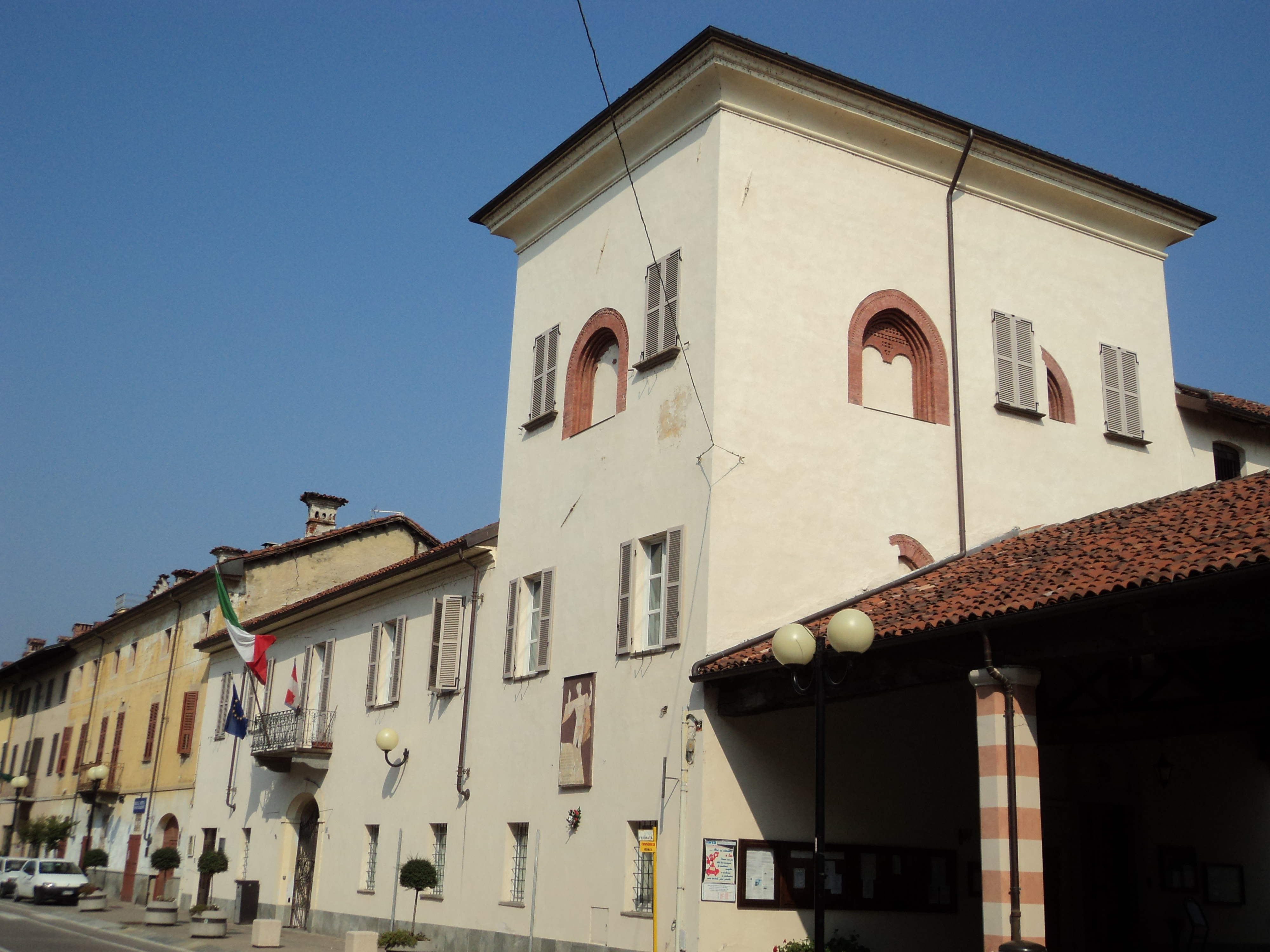 Palazzo comunale a Villafranca Piemonte - Provincia di Torino